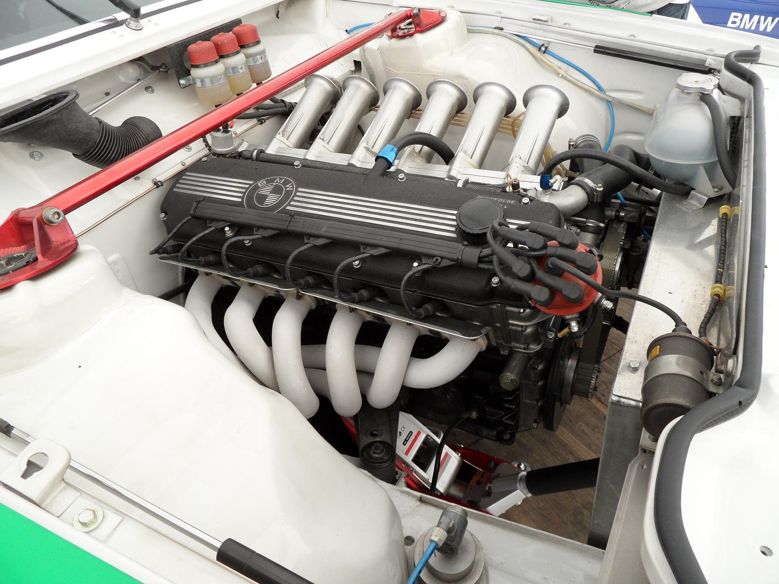 Motor eines BMW 635 CSi Gruppe 2 Renncoupé, Fächerkrümmer